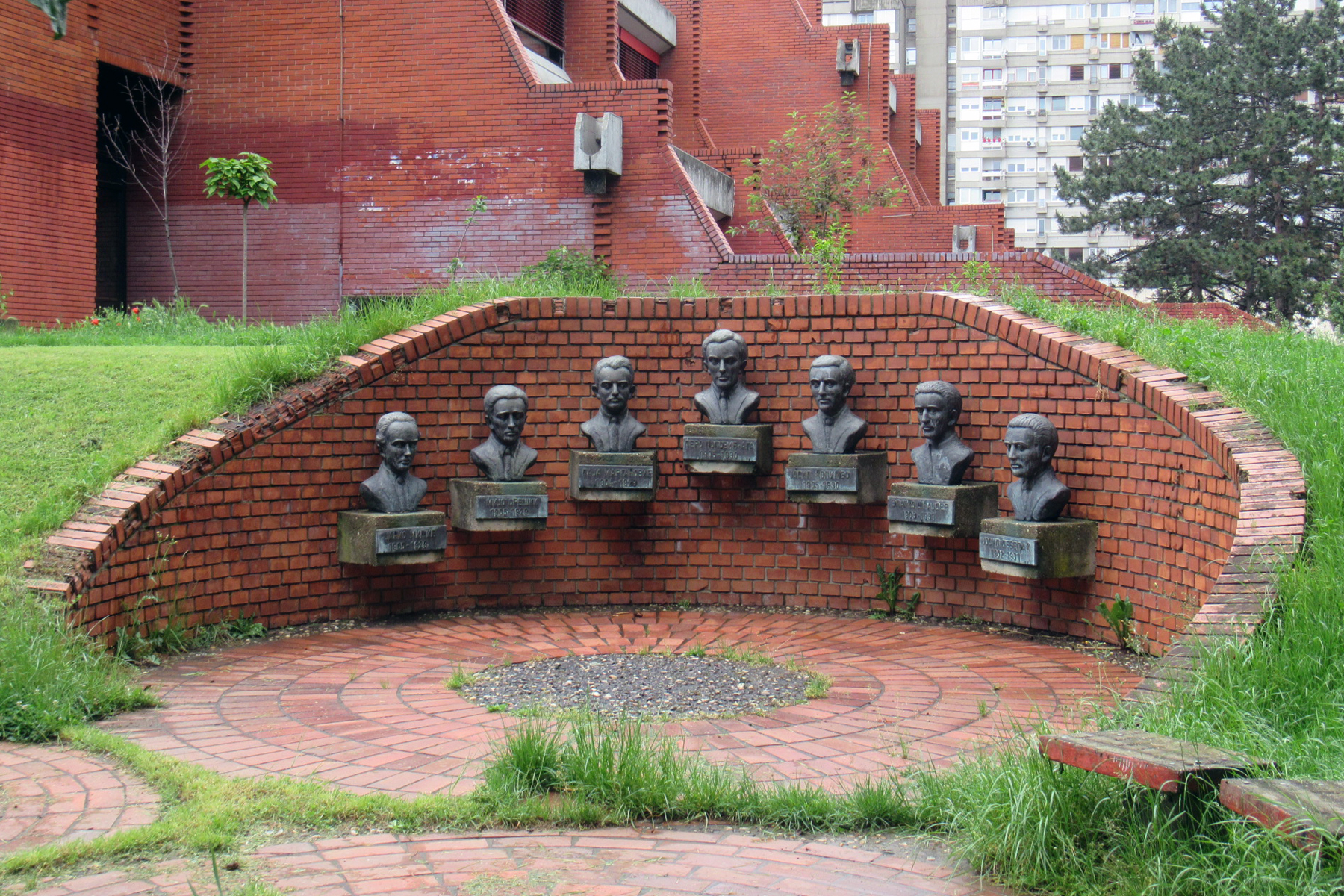 Спомен бисте седморице секретара СКОЈ-а, у Дворишту ОШ "Седам секретара СКОЈ-а", на Новом Београду.